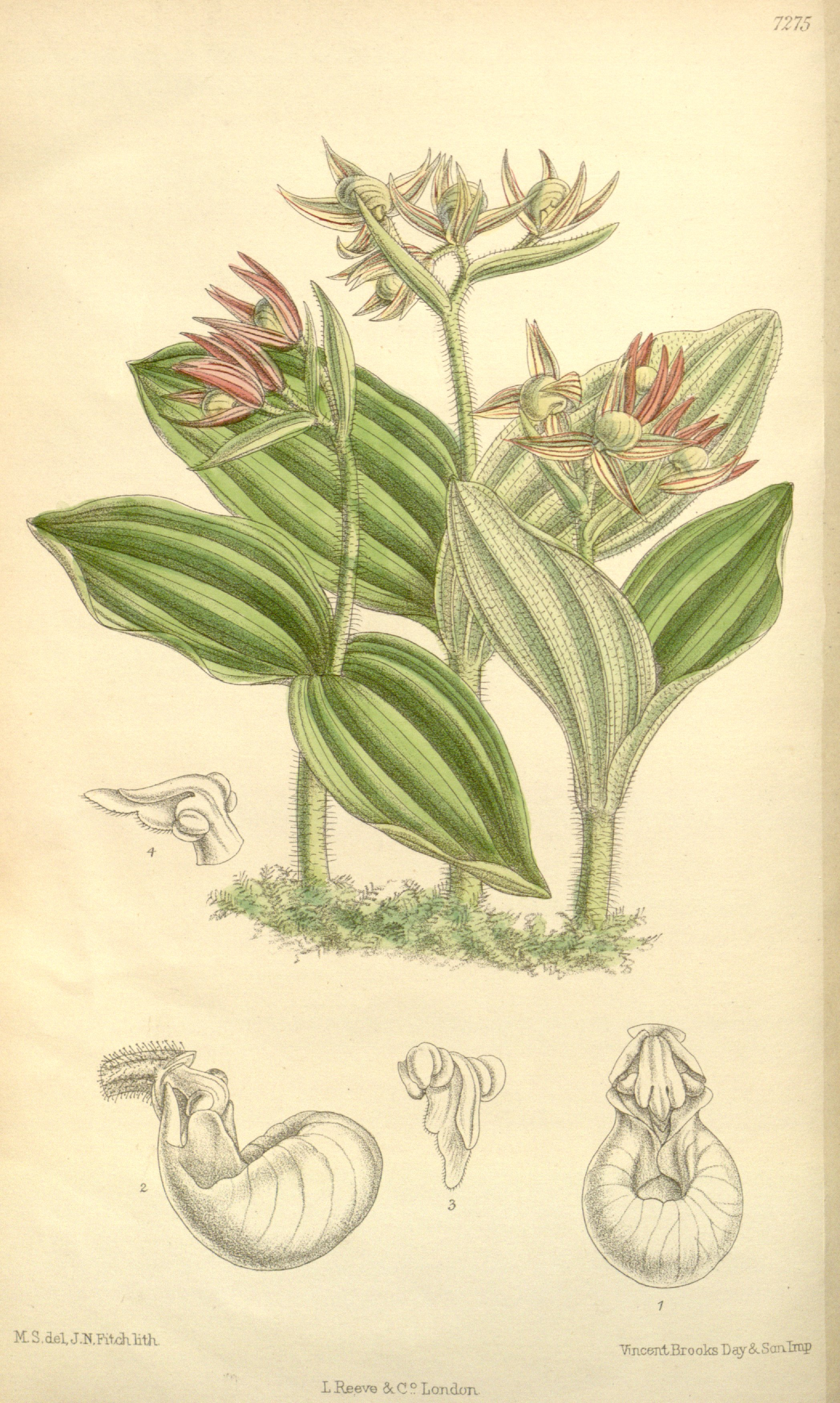 Illustration of Cypripedium fasciculatum (Orig. Cypripedium fasciculatum var. pusillum)